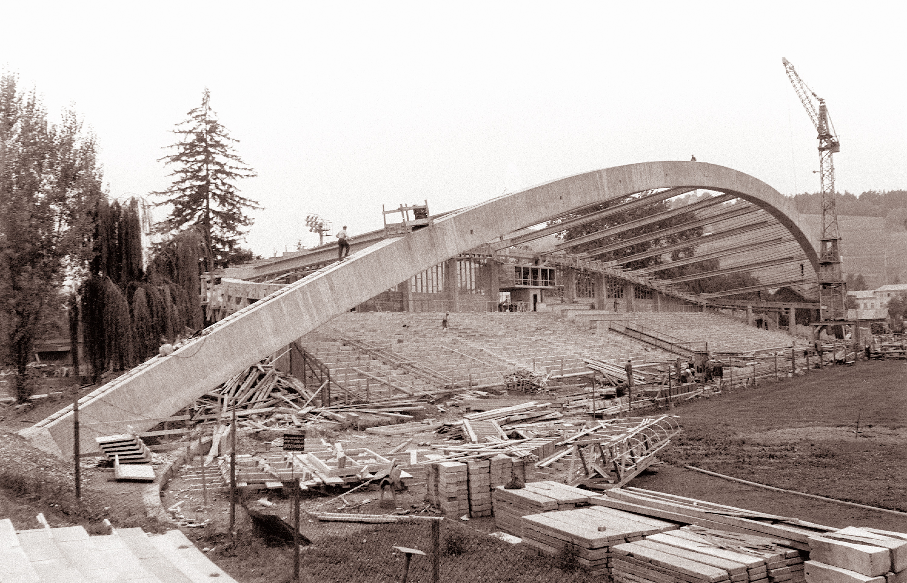 Dela na stadionu Ljudski vrt